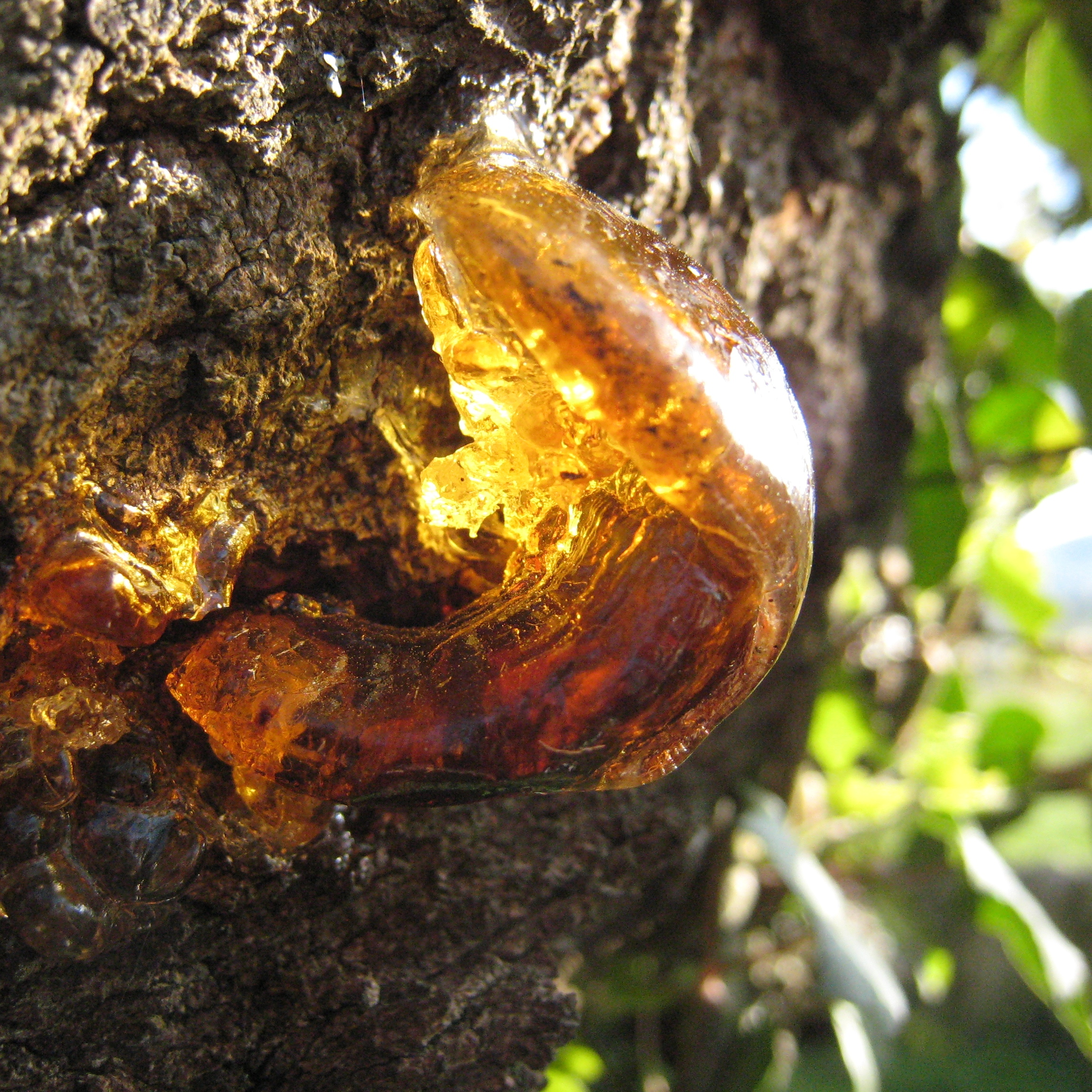 plant sap /goutte de sève